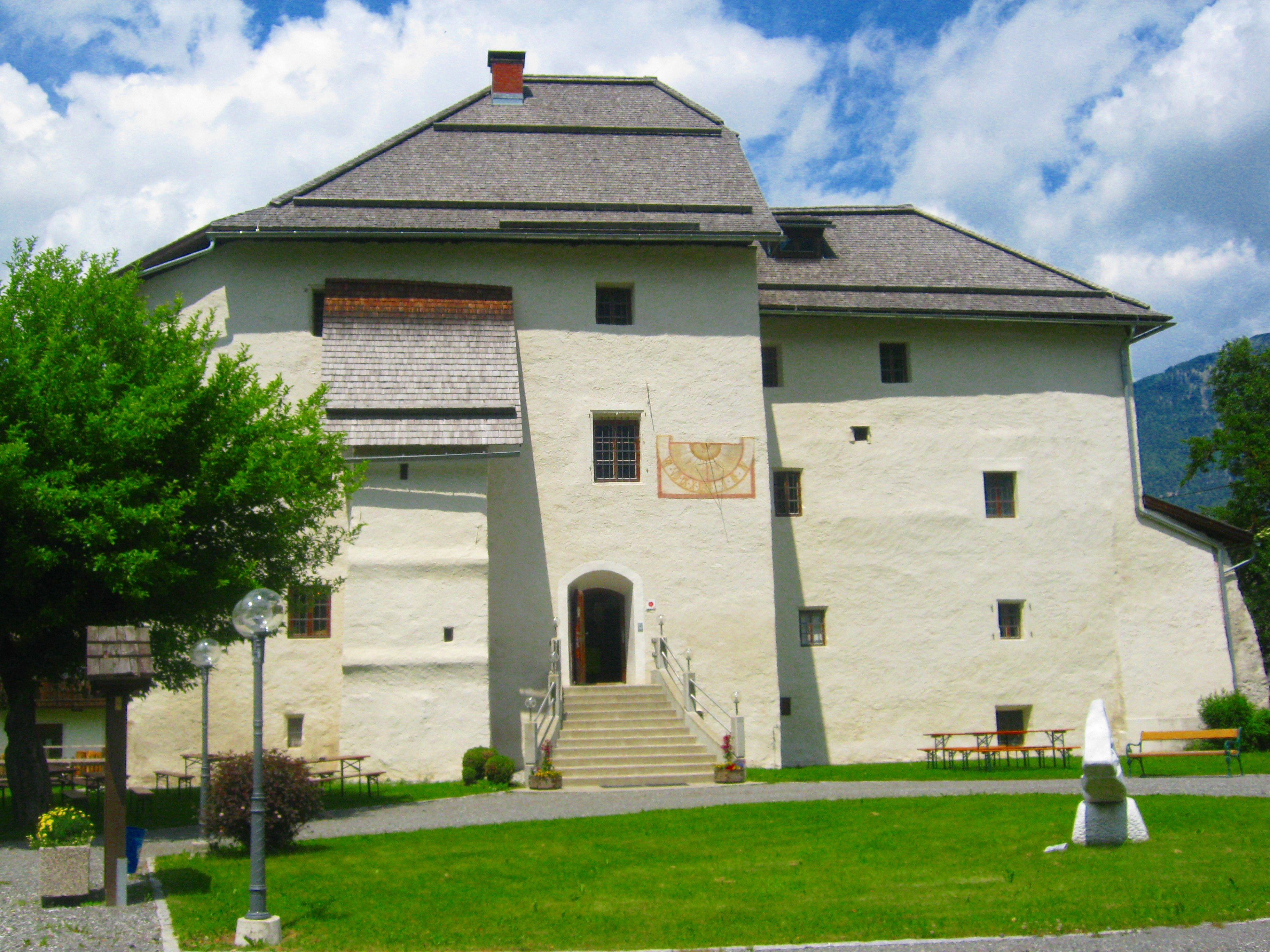 Schloss Möderndorf in Hermagor-Presseggersee